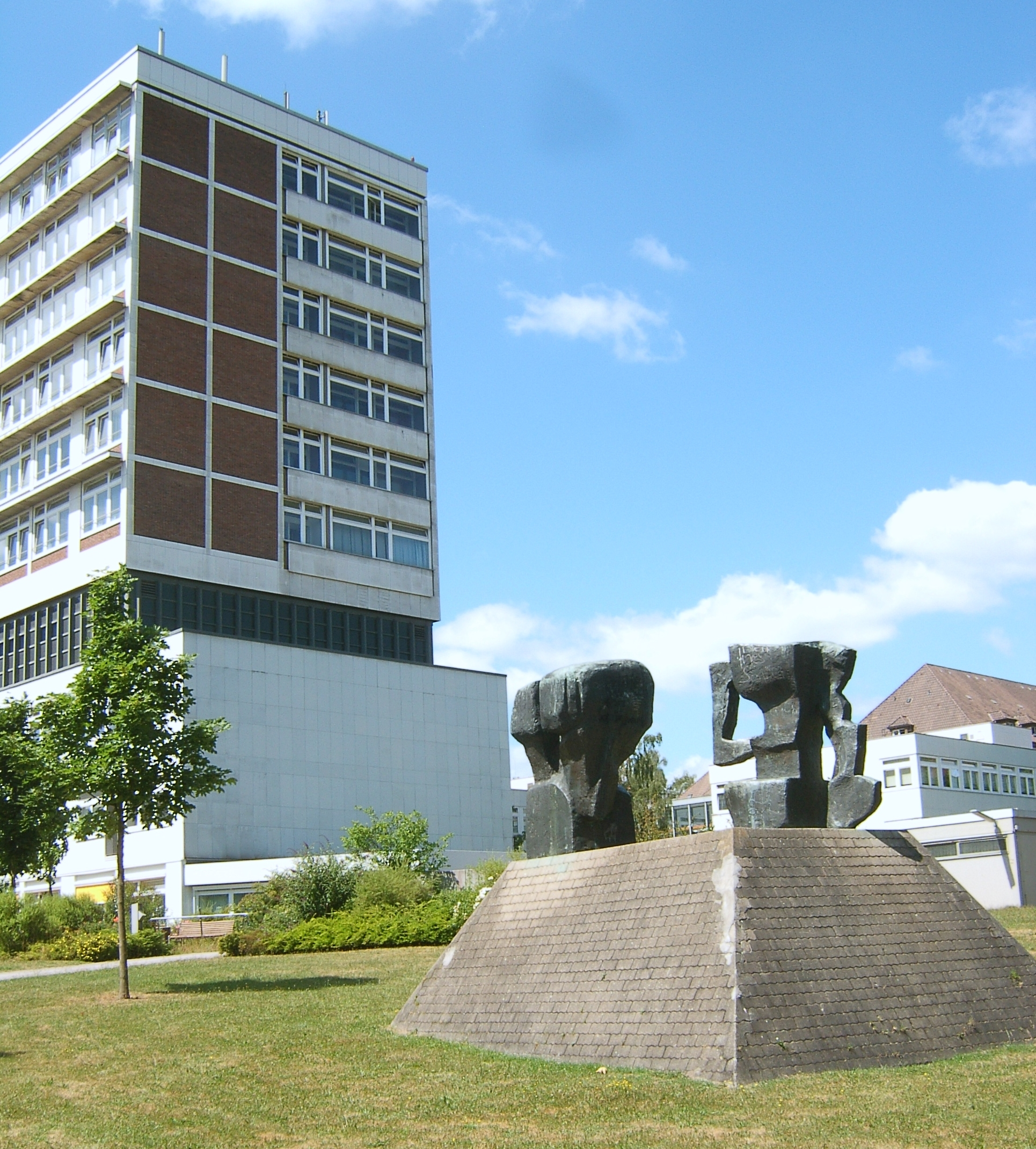 Bildbeschreibung: Hamburg, Heimfeld, AK Harburg Fotograf: selbst Datum: 19.07.2006